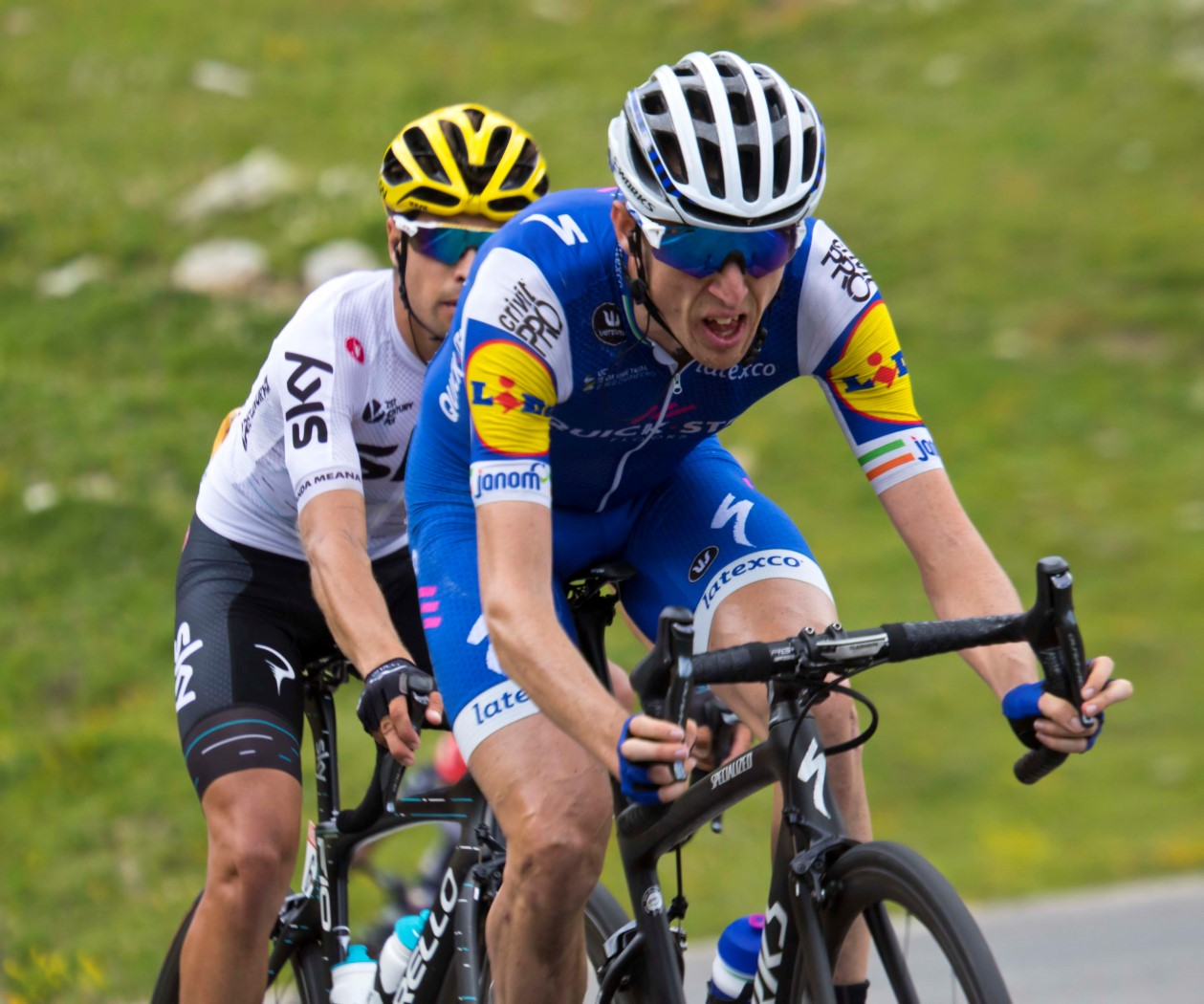 19-7_6 martin